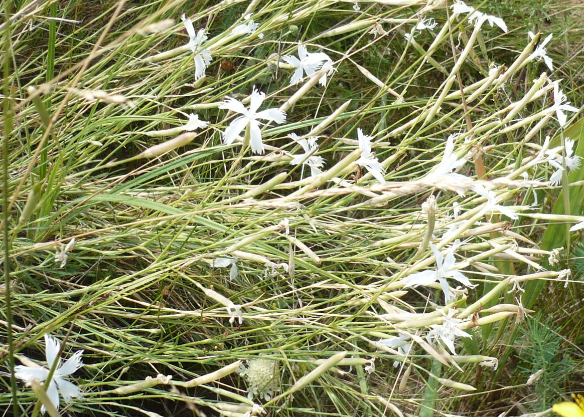 Dianthus serotinus, Tarbucka near Streda nad Bodrogom in east Slovakia